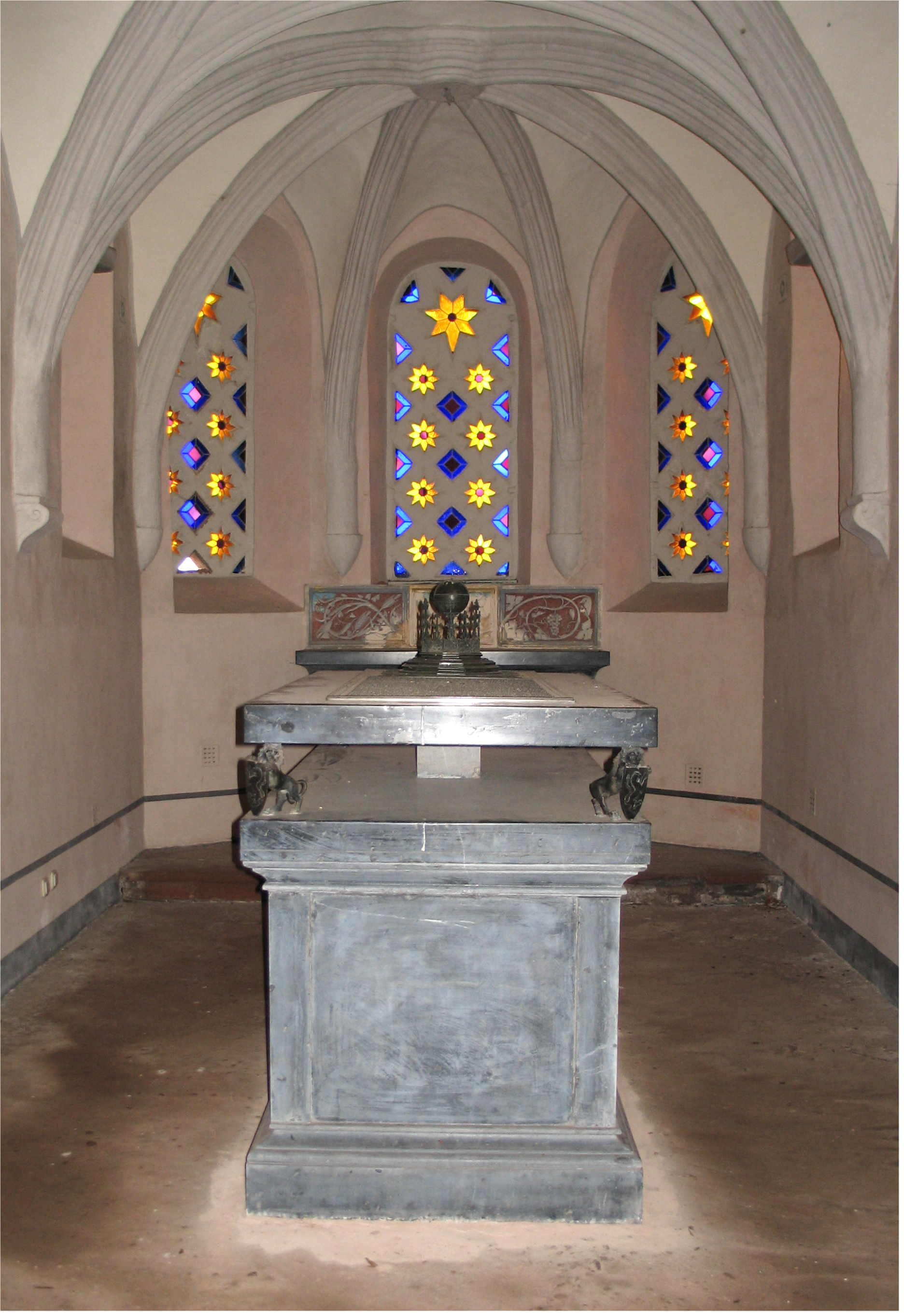 D'Grafkapell vu bannen.